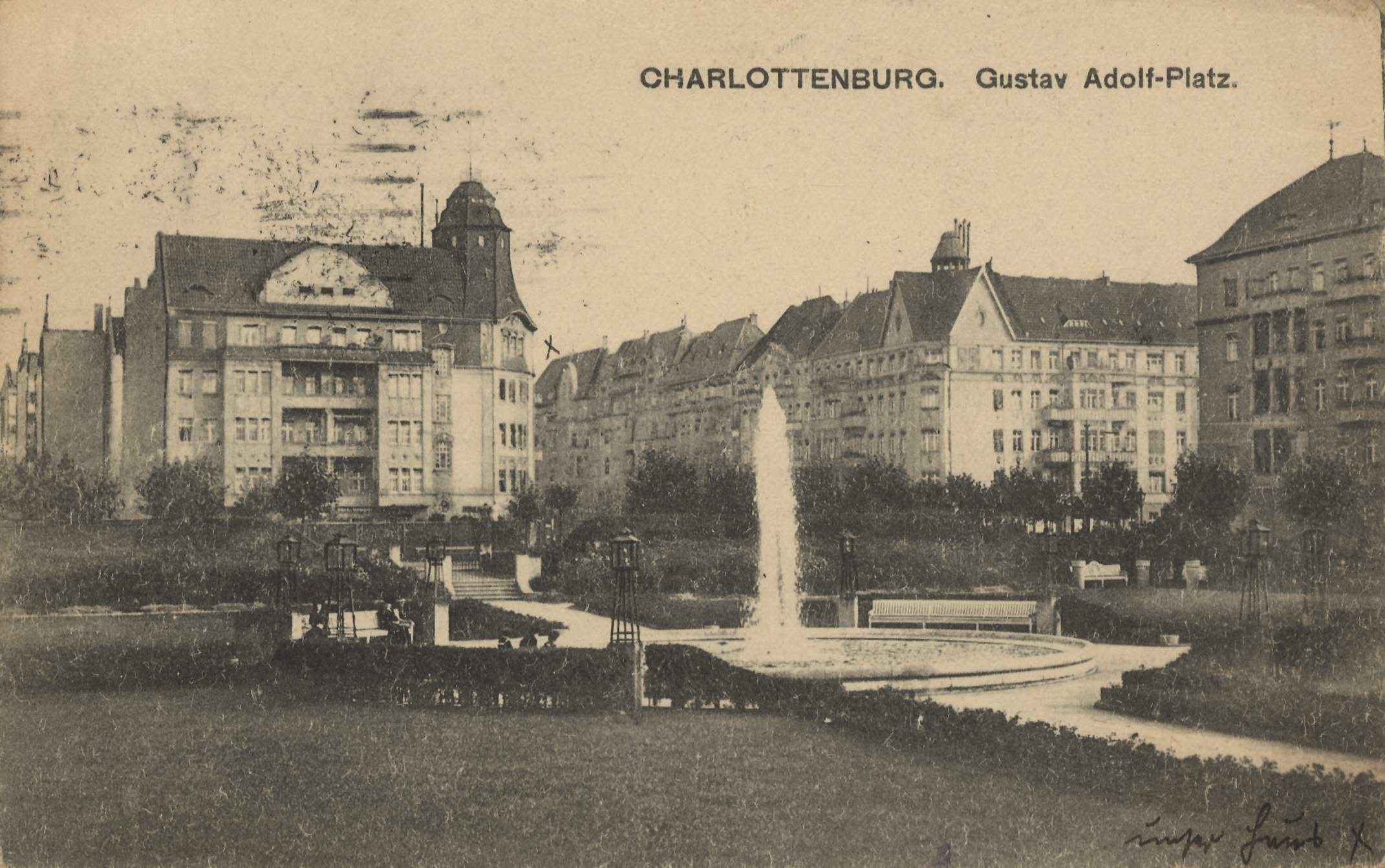 Gustav-Adolf-Platz (heute Mierendorffplatz) in Charlottenburg